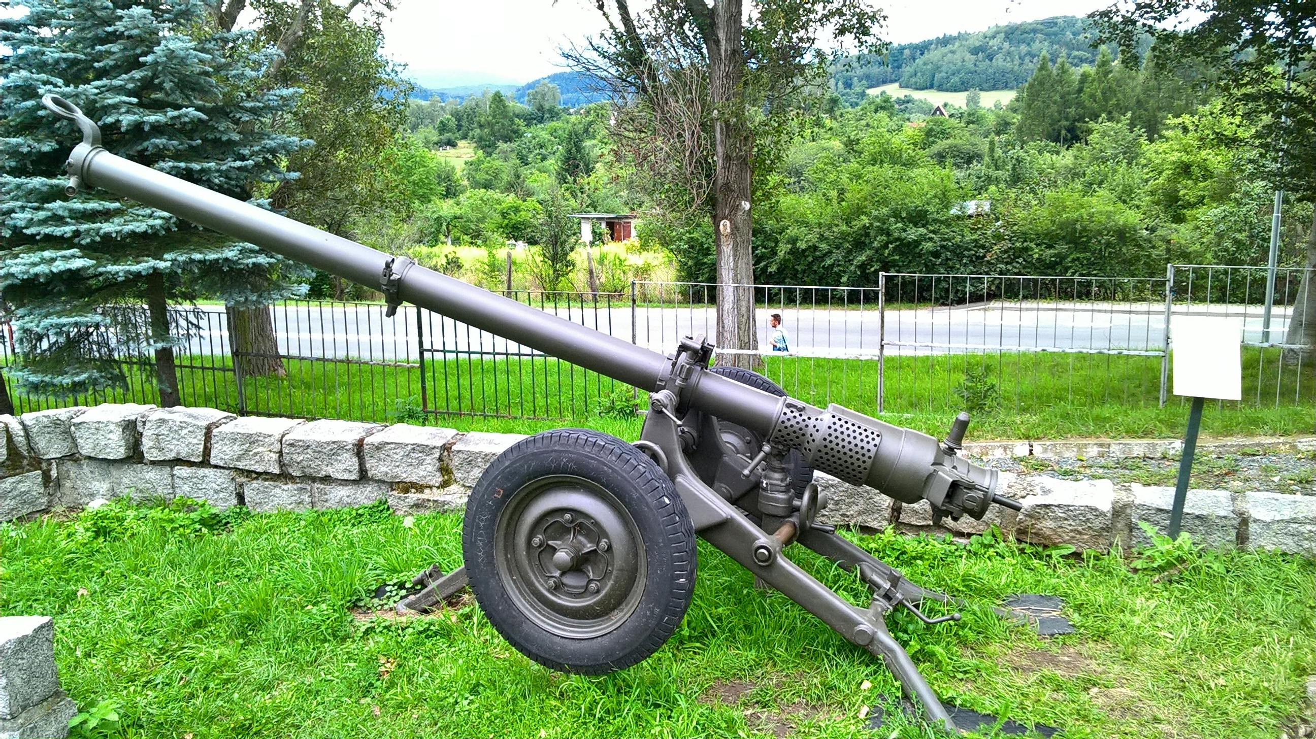 107 mm działo bezodrzutowe B-11 w Skansenie Uzbrojenia Wojska Polskiego w Jeleniej Górze